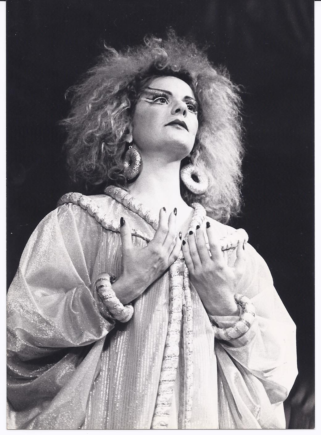 רזיה ישראלי בהצגה הזונה הגדולה מבבל